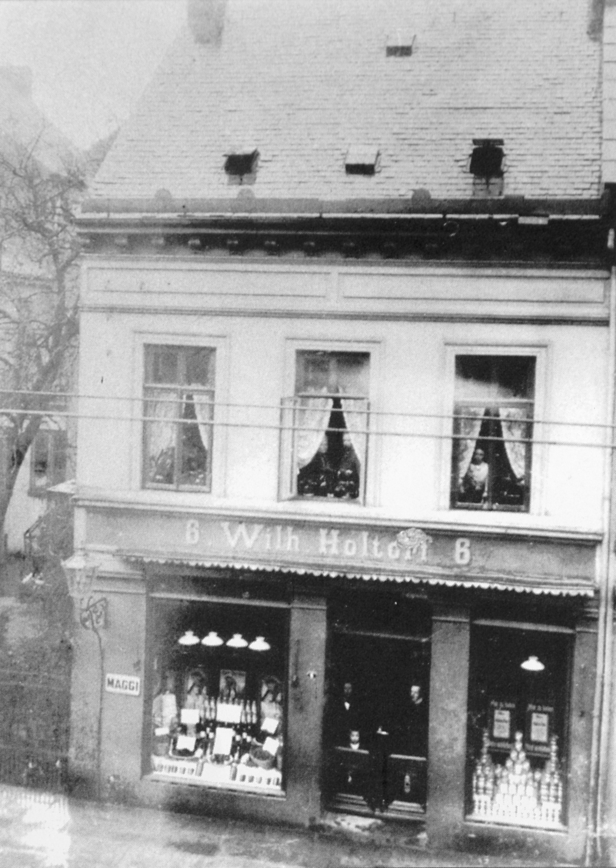 Kolonialwarenladen Wilhelm Holtorf in Bremen, Ostertorsteinweg 6. Zeit der Aufnahme zwischen 1874 (Gründung) und 1910 (Neubau) Das abgebildete Objekt ist ein geschütztes Kulturdenkmal in der Freien Hansestadt Bremen, mit der Nr. 0972 beim Landesamt für Denkmalpflege registriert.